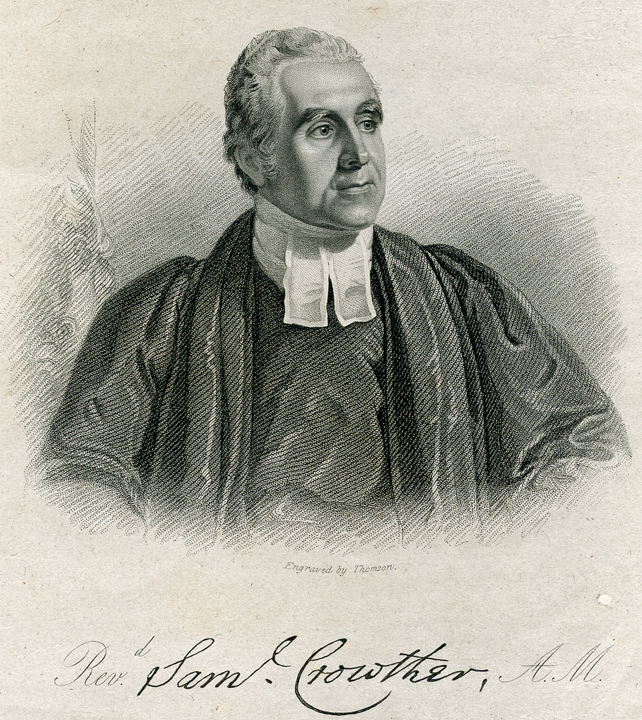 Gravura de 1828 representando o reverendo anglicano Samuel Crowther, que inspirou o nome de batismo de Samuel Ajayi Crowter.